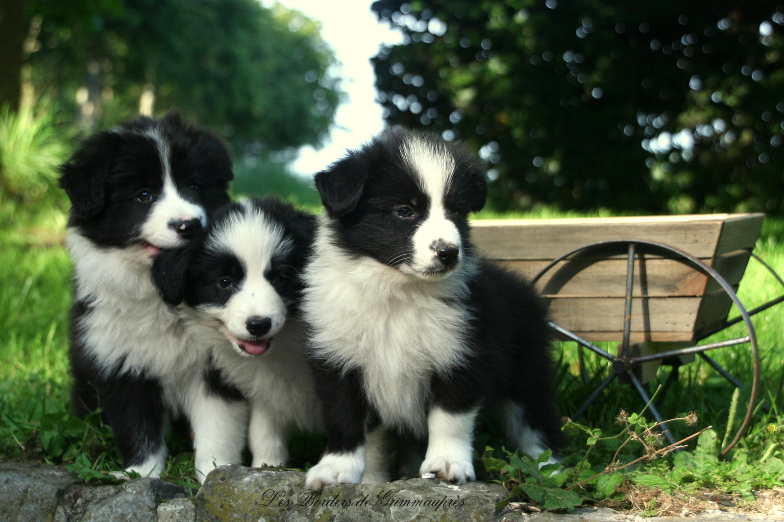 L'élevage de Grimmauprès se situe en Belgique, 0(032)475 225543